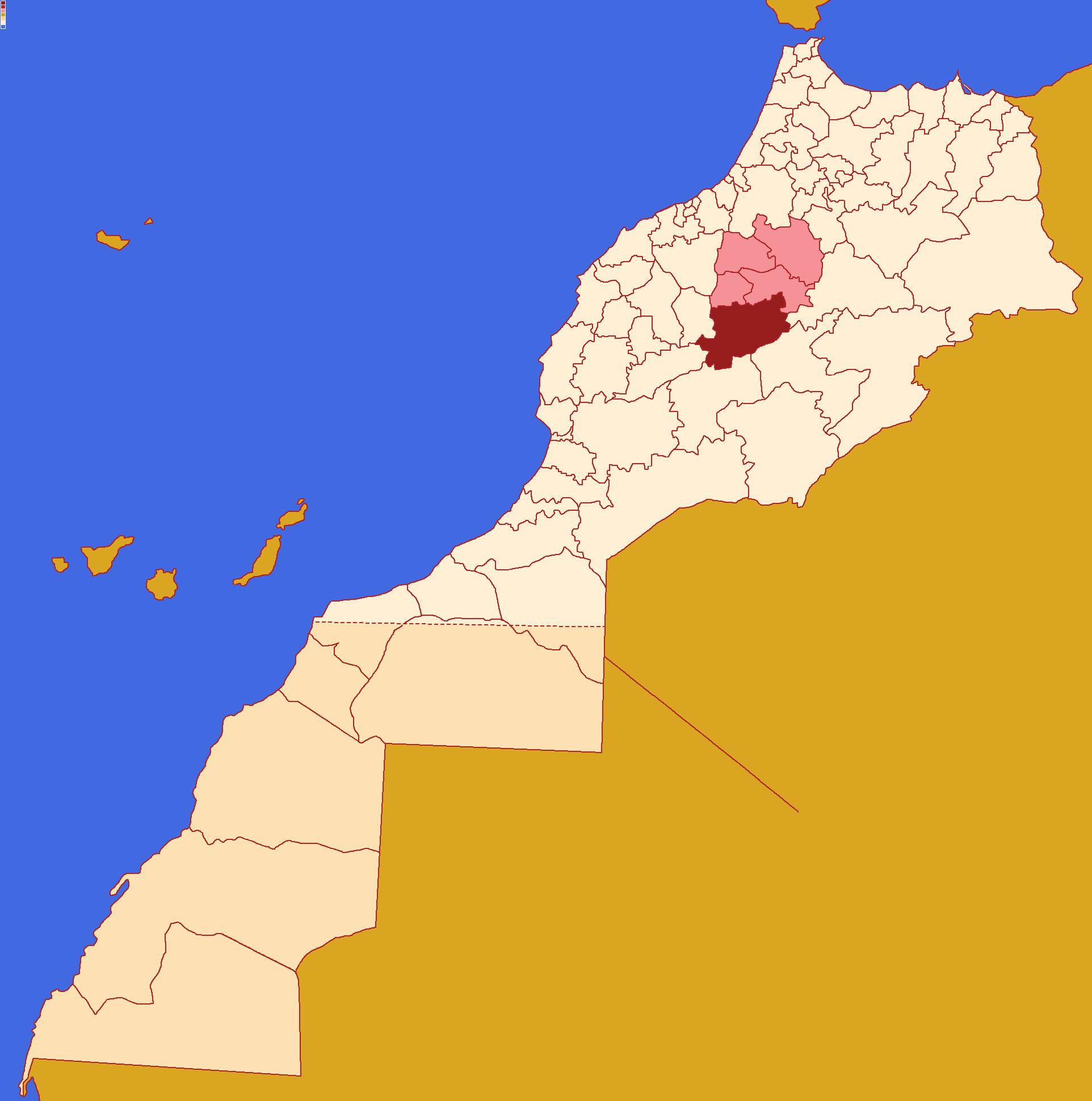 Localização da província de Azilal ,dentro da região de Beni Mellal-Quenifra ,dentro de Marrocos.Conforme a reforma administrativa de 2015.